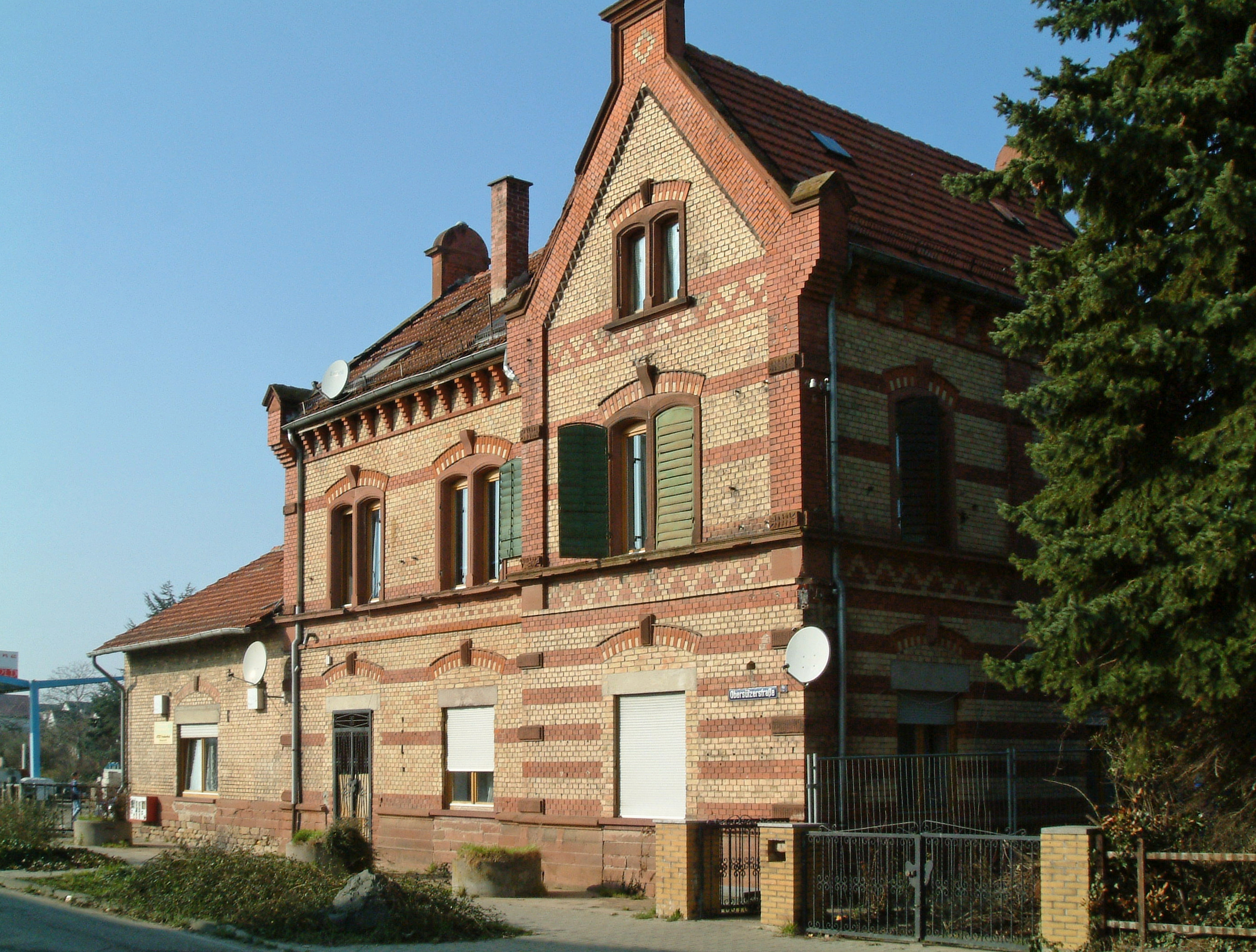 Alter Bahnhof zu Dirmstein, selbst fotografiert am 2007-02-18 und freigegeben durch Benutzer:Mundartpoet